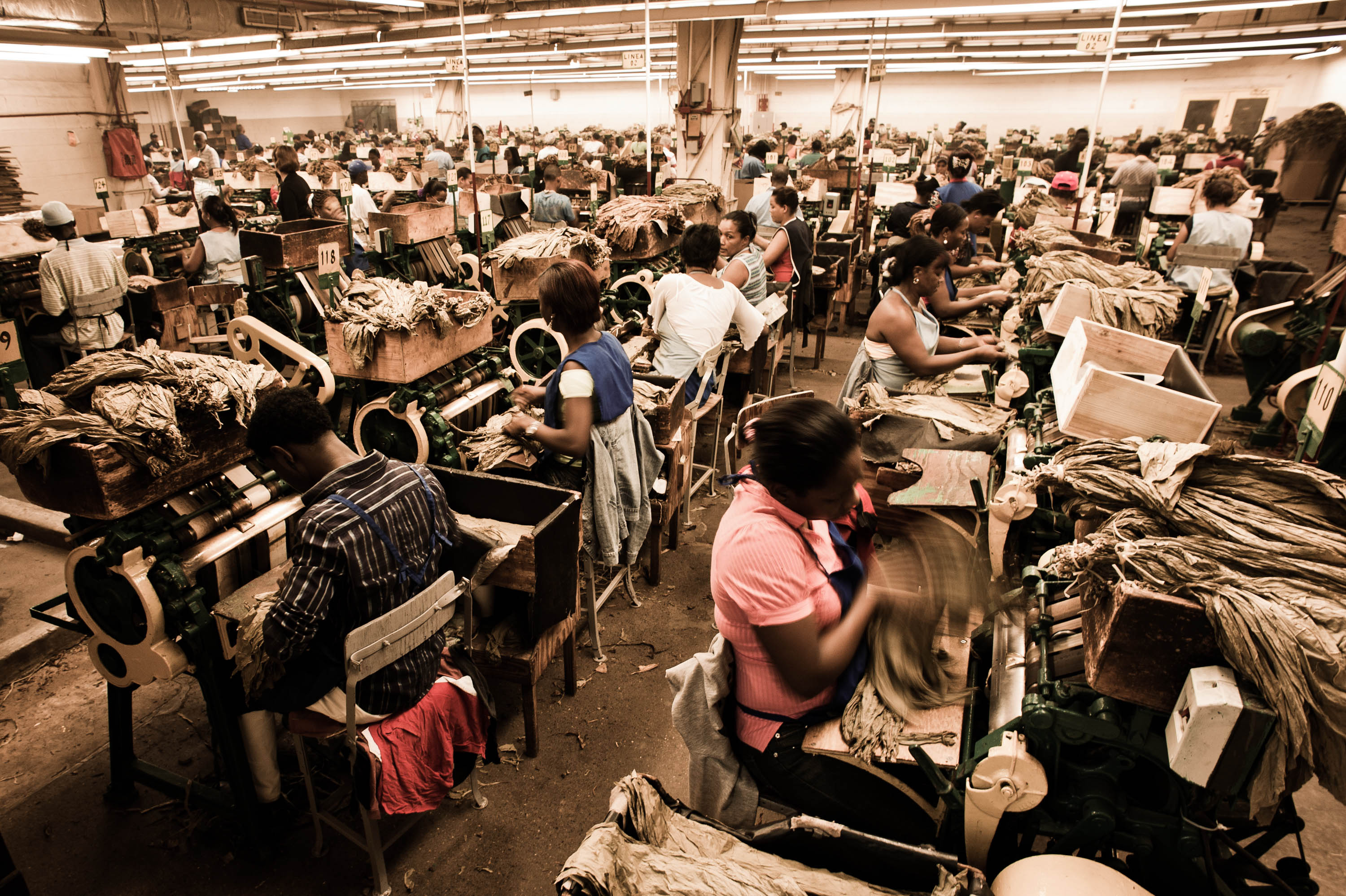 Keywords:Caribbean; Casa Del Campo; Cigar factory; Dominican Republic; La Romana; Домениканская республика; Карибские острова; Ла Романа; Фабрика Сигар Handmade cigar production, process. Shopfloor of Tabacalera de Garcia Factory. Casa de Campo, La Romana, Dominican Republic.